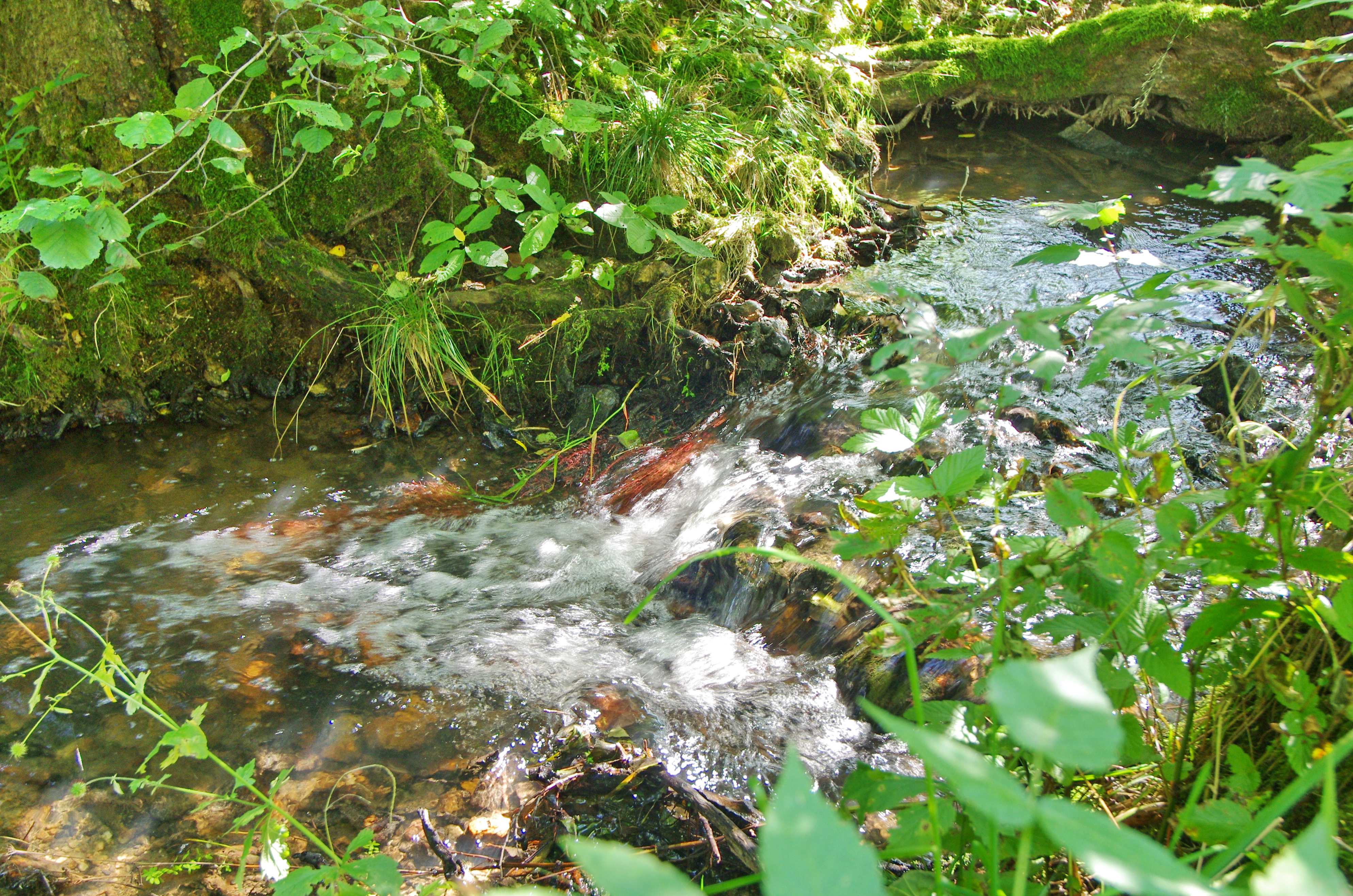 Potok Lubinka, přítok Plesné v okrese Cheb, v místě nedaleko osady Božetín